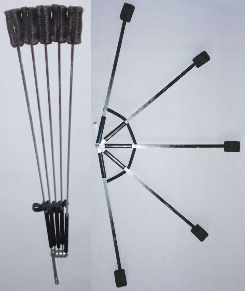 Klappbare Feuerfächer im geschlossenen und aufgeklappten Zustand.